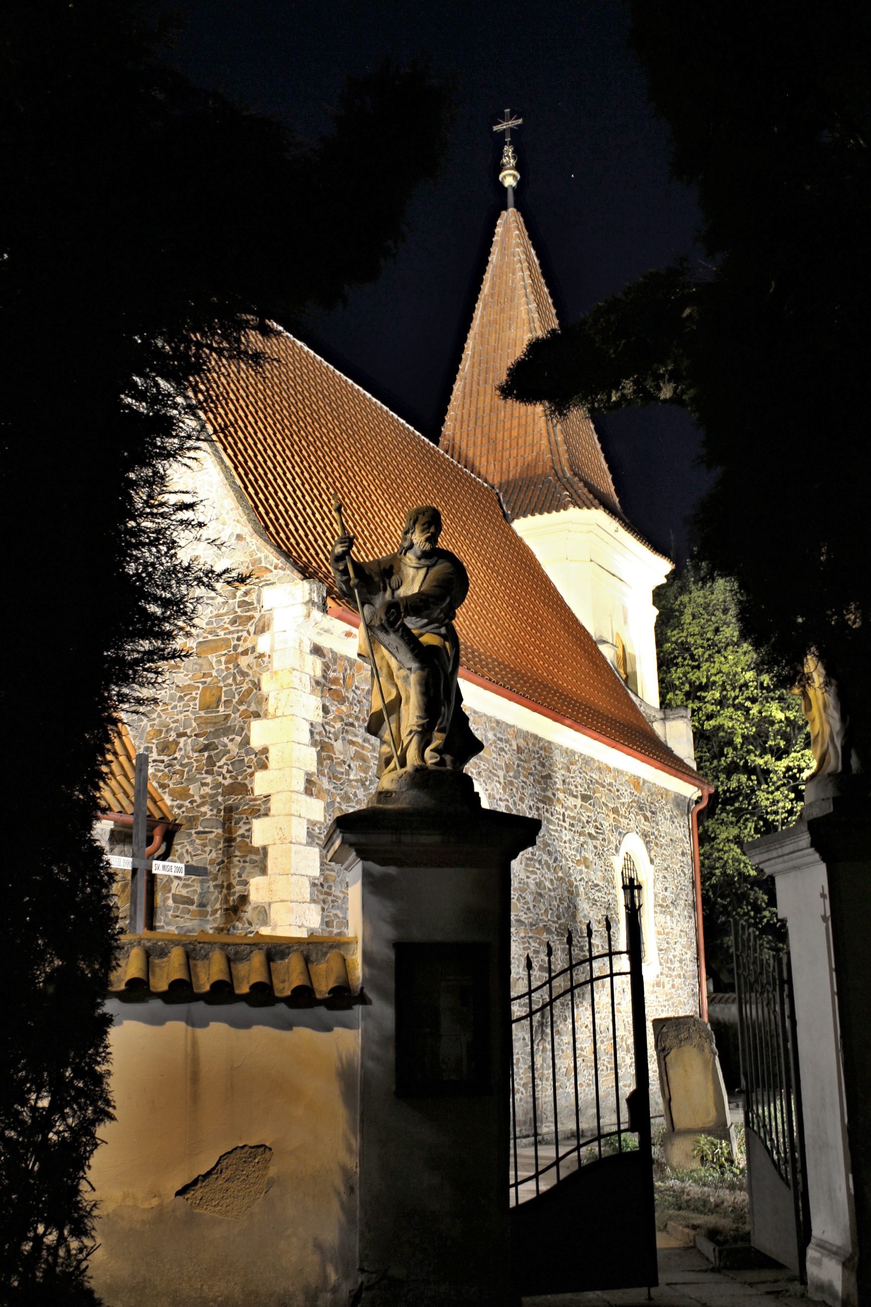 Praha-Petrovice, kostel sv. Jakuba Většího